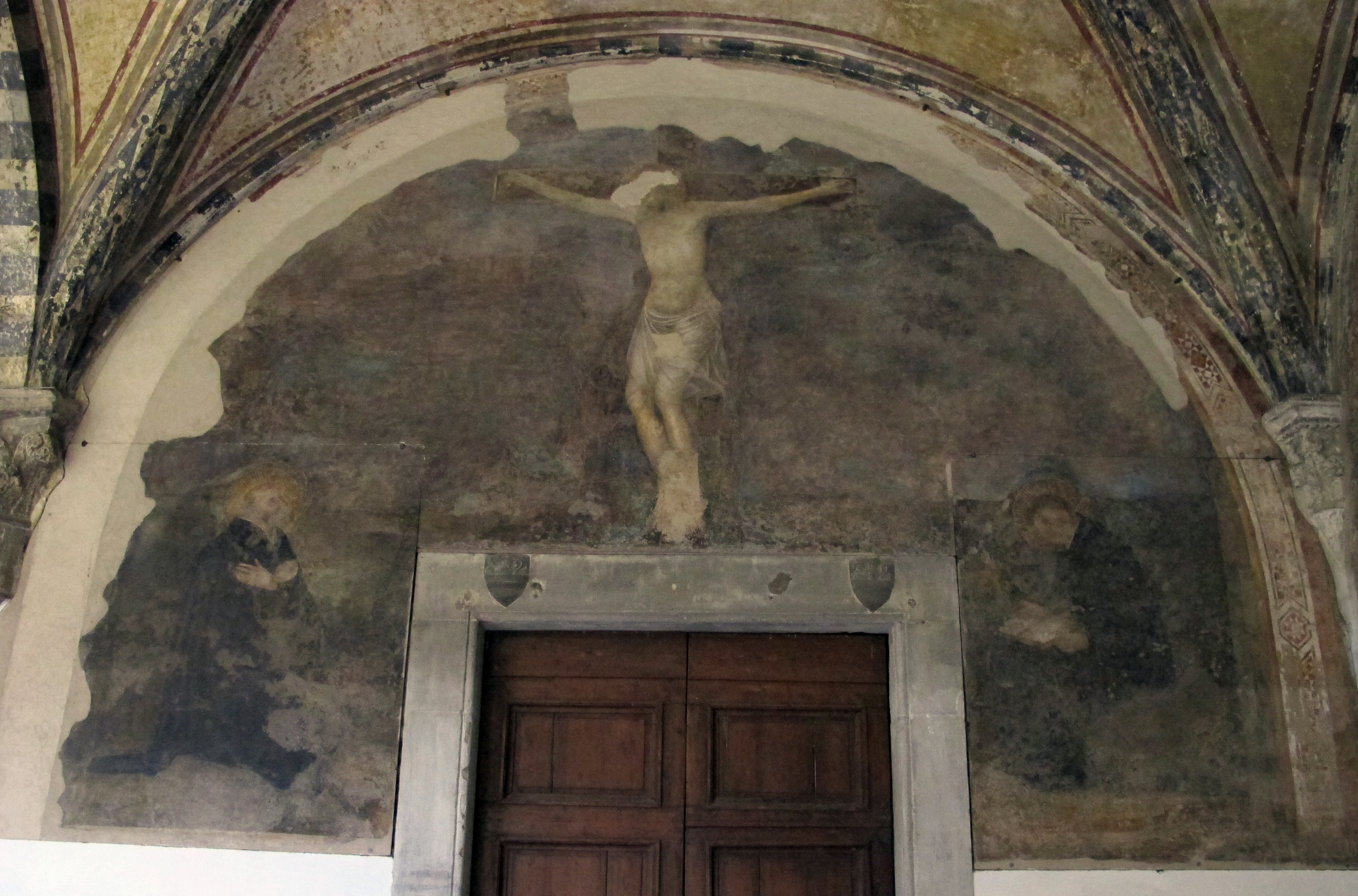 Stefano fiorentino (attr.), crocifisso tra i santi domenico e tommaso d'aquino